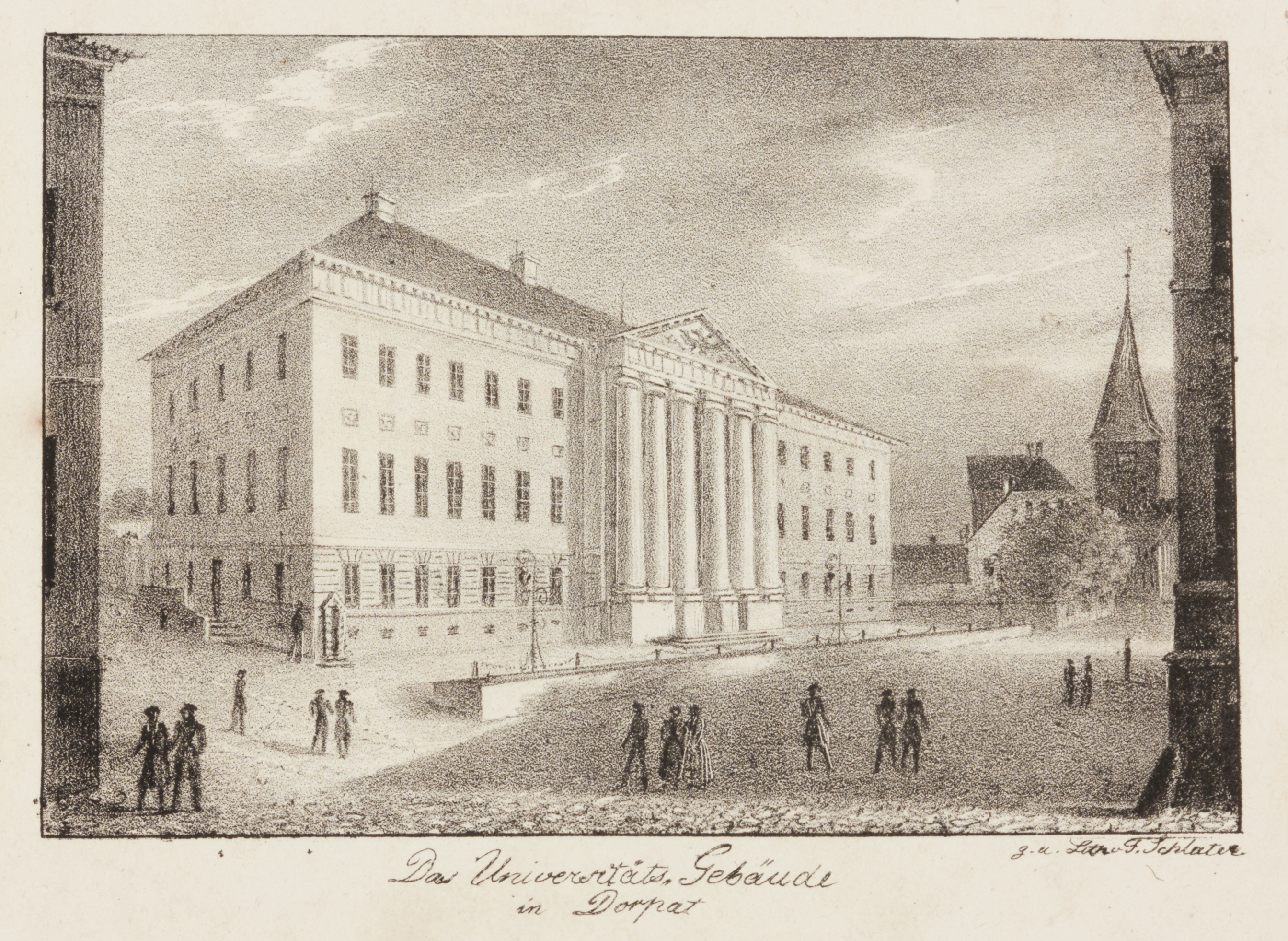 "Tartu Ülikooli peahoone" (1832–1835). Litograafia. Kujutise kõrgus 8,9 ja laius 13,3 cm, lehe kõrgus 17,8 ja laius 22,3 cm. This image on crowdsourcing geotagging platform Ajapaik MUIS:TKM TR 4010 G 1240